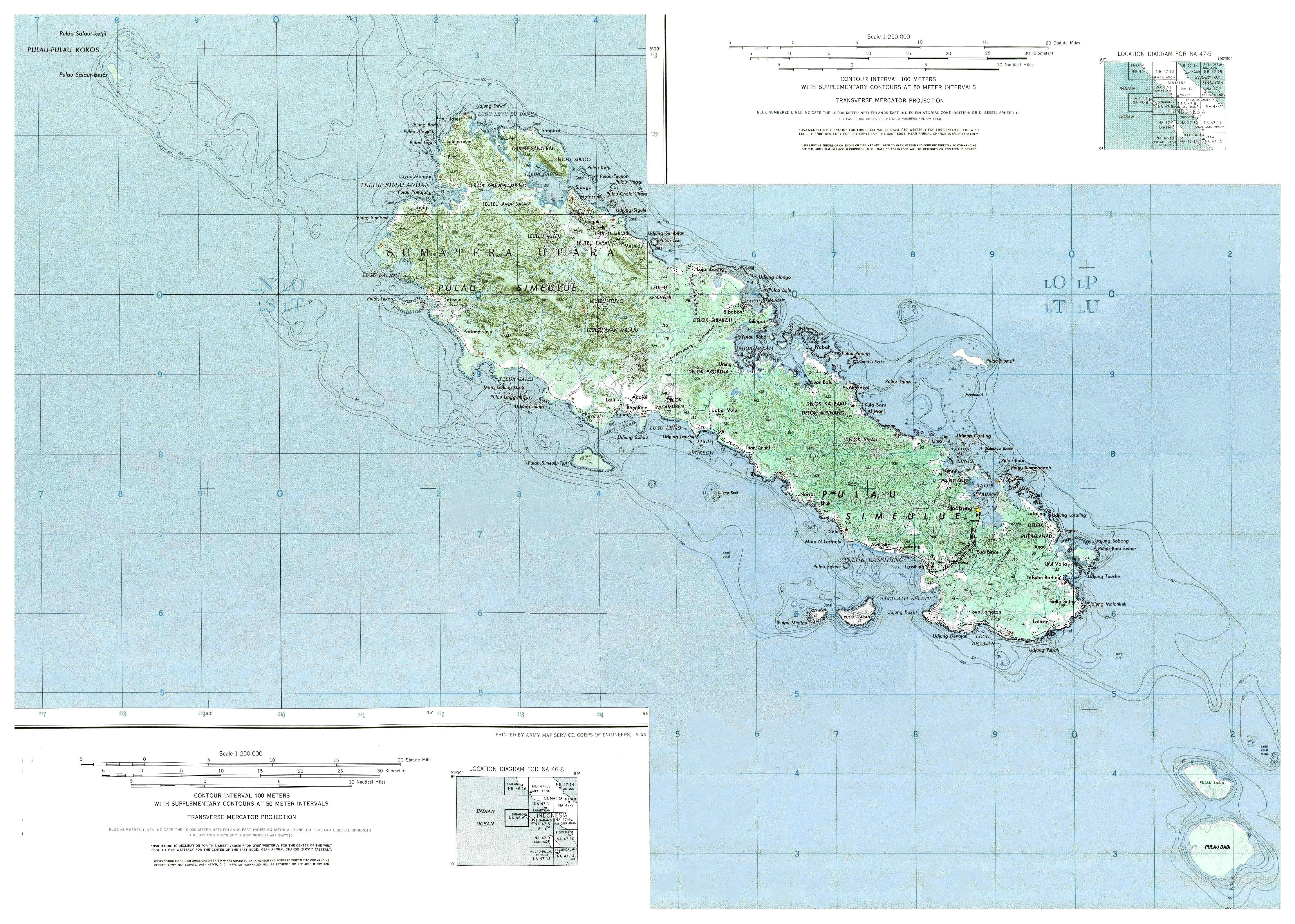 Pulau Simeuluẽ